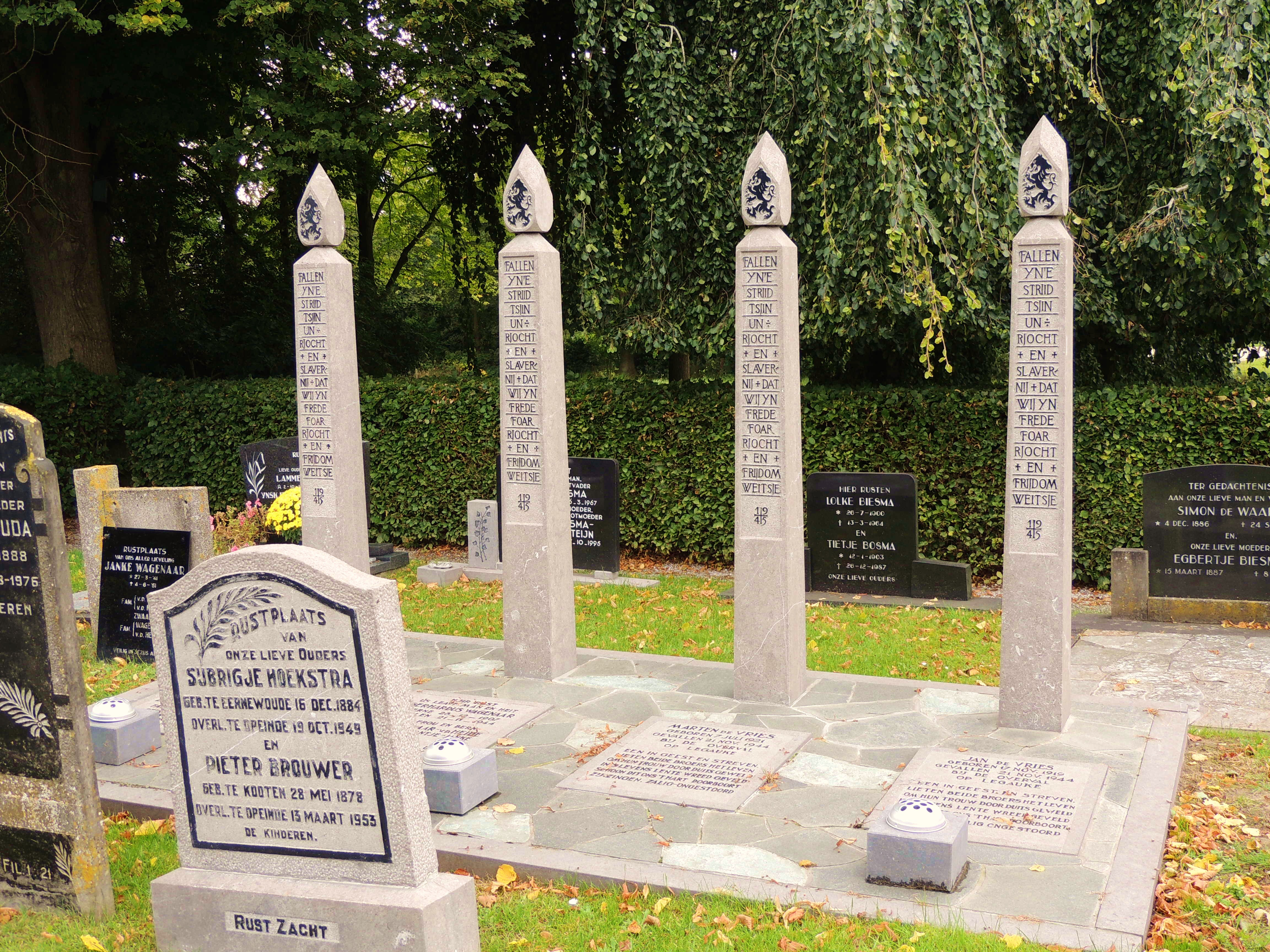 Opeinde Graven. Fallen yne srtiid tsjin Unrjocht